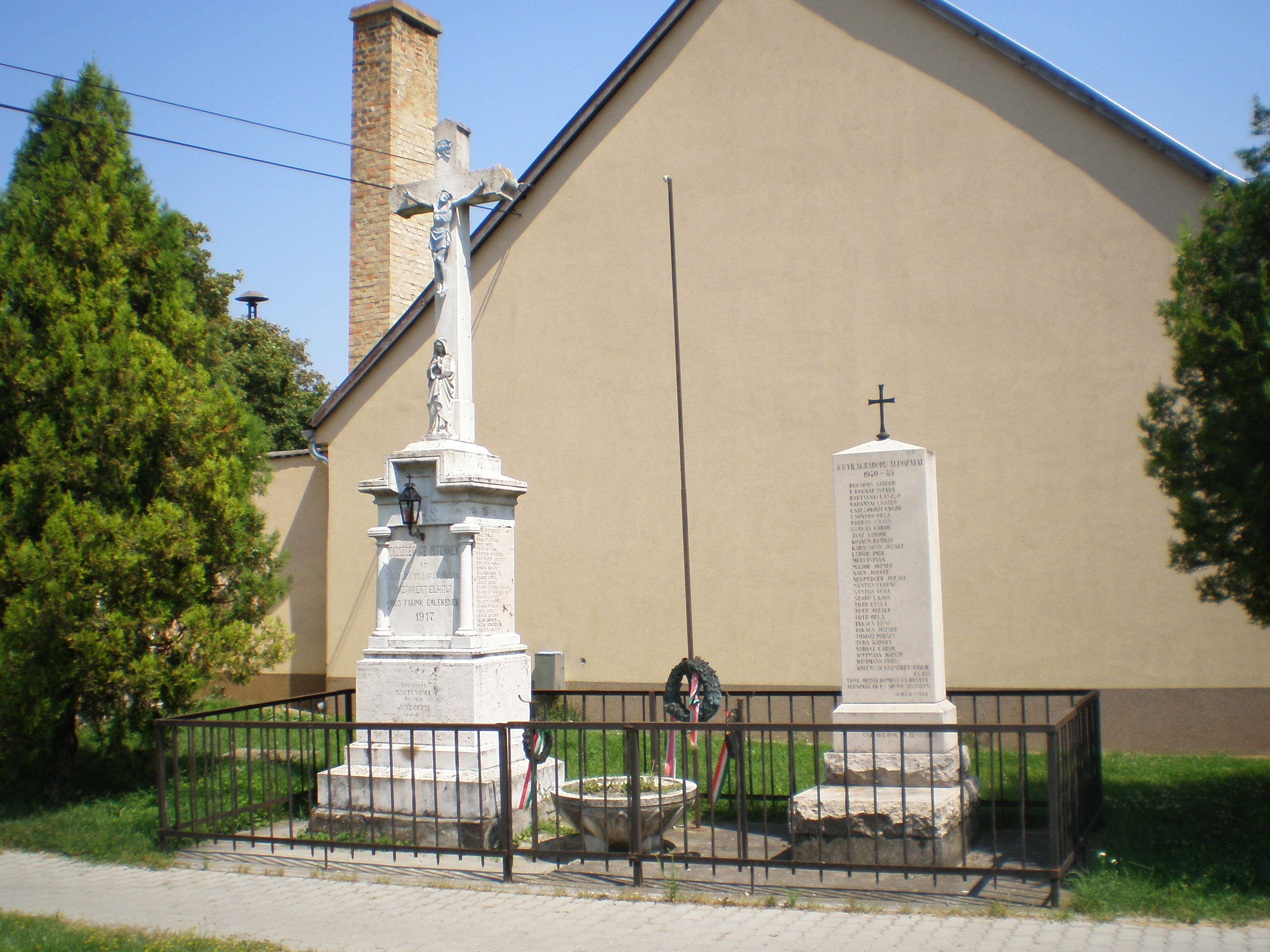 Világháborús emlékművek (Győrzámoly, Győr-Moson-Sopron megye, Magyarország)